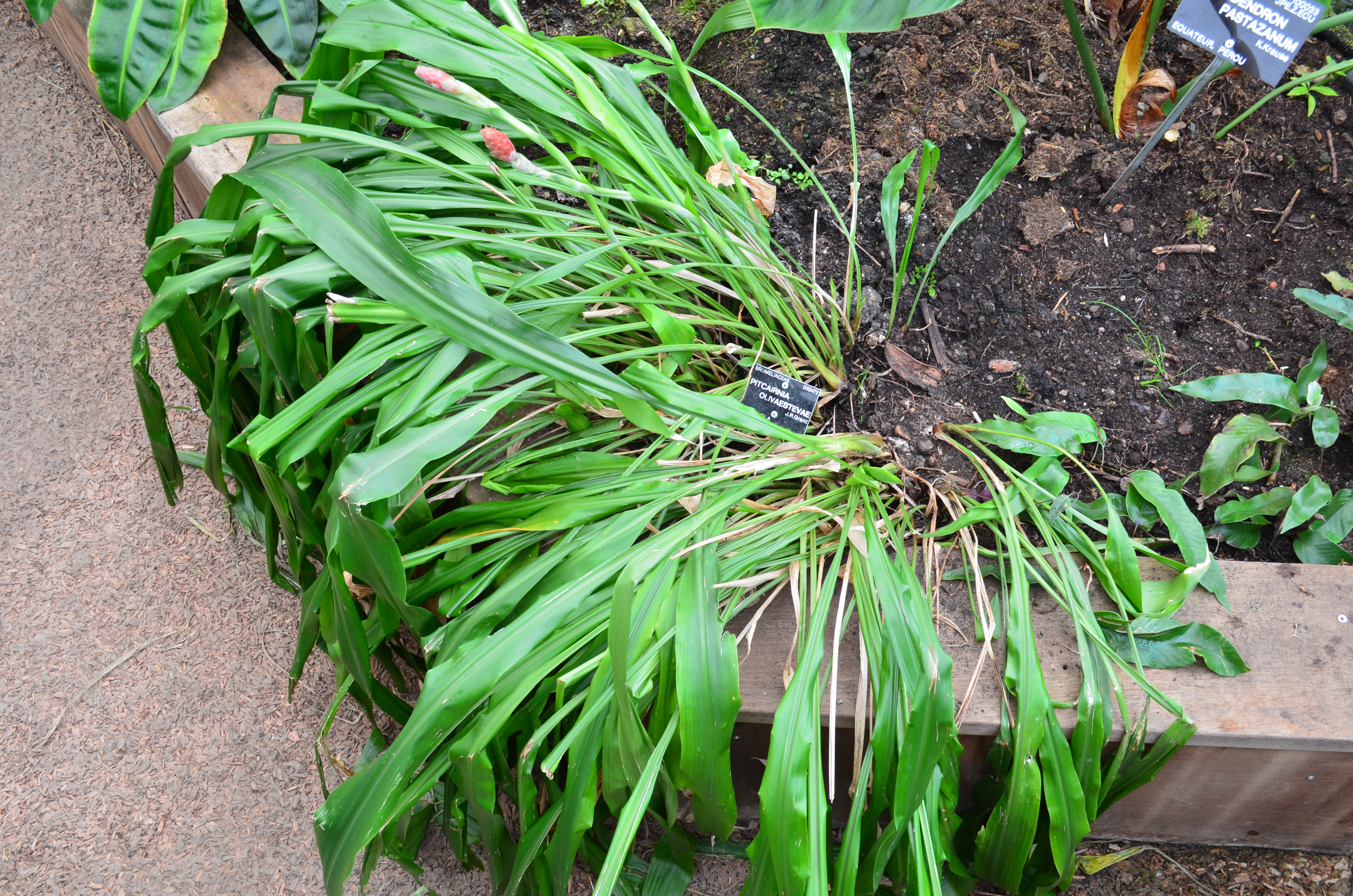 Spécimen de Pitcairnia olivaestevae, cultivé dans les serres du jardin botanique de Lyon au parc de la Tête-d'Or